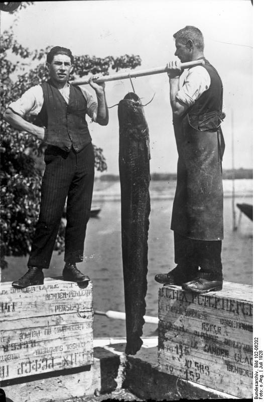 Fischerglück am Bodensee! In Friedrichshafen a/Bodensee wurde ein selten großer Wels in einem Gewicht von 80 Pfund und einer Länge von 1,75 m gefangen. Unser Bild zeigt die glücklichen Fischer mit ihrem Riesenwels.